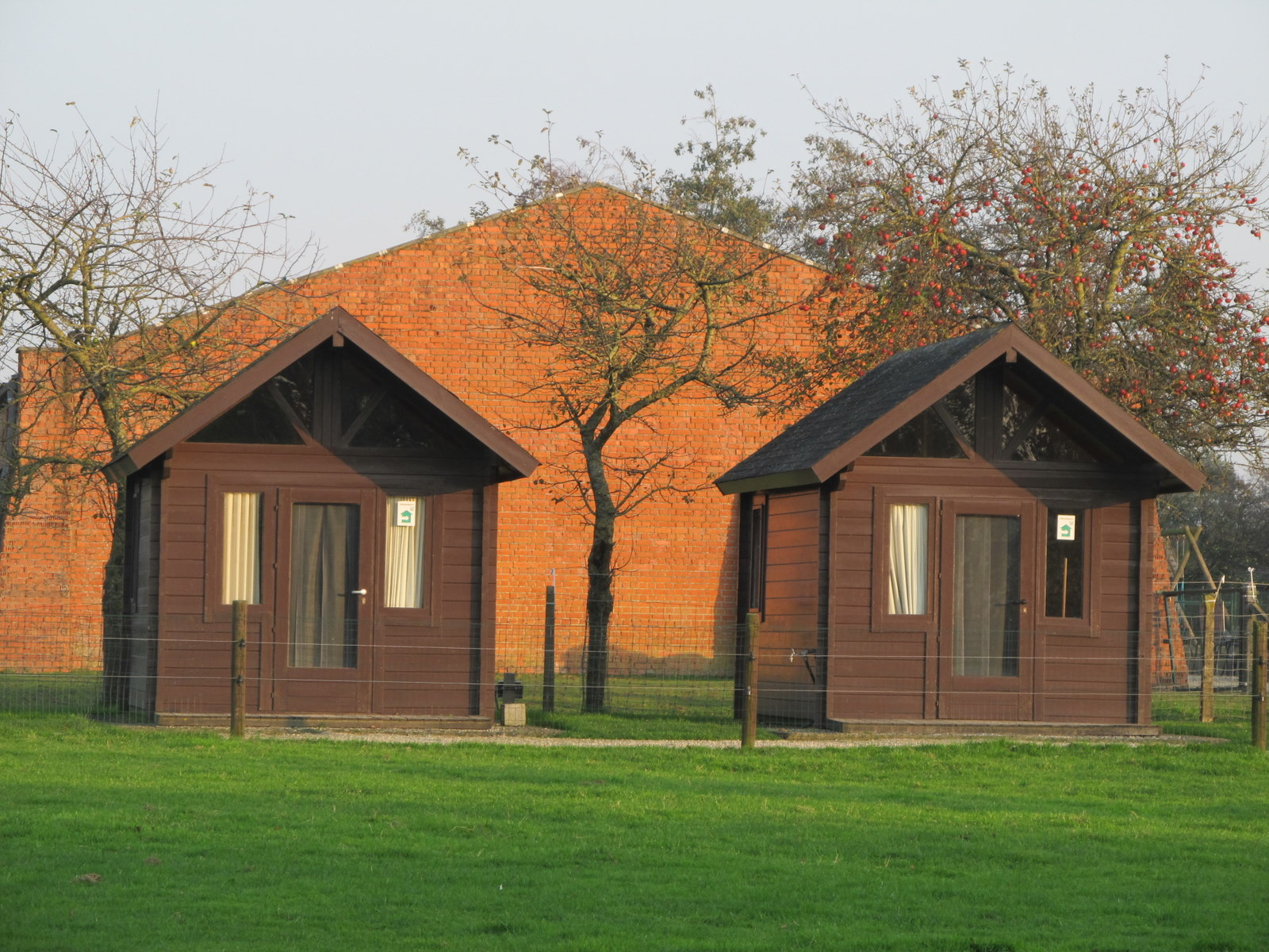 20111112 Torhout Kinderboerderij